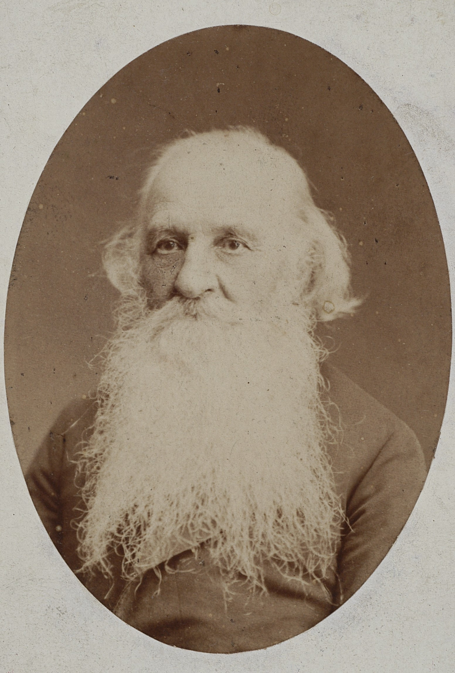 Tomasz Bułhak, ok. 1885 r.